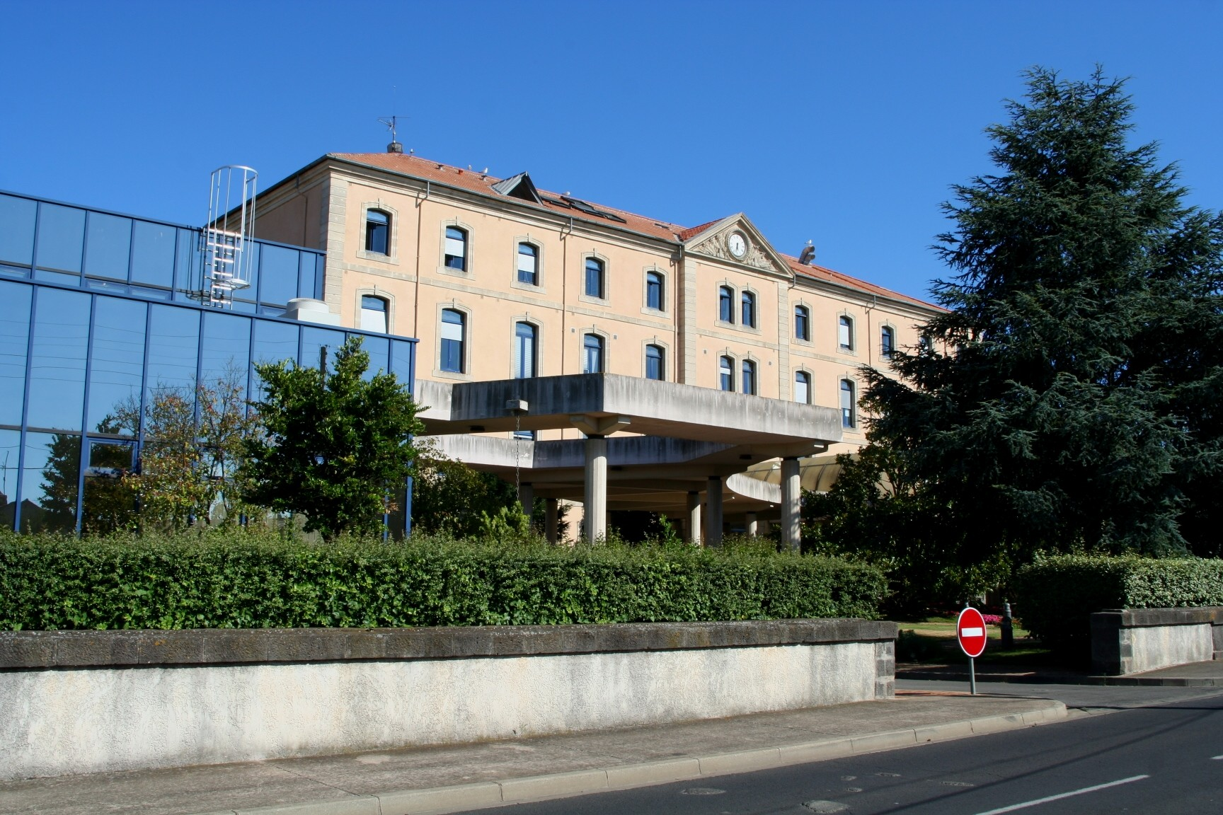 Hôtel de ville d'Agde (Hérault - France)